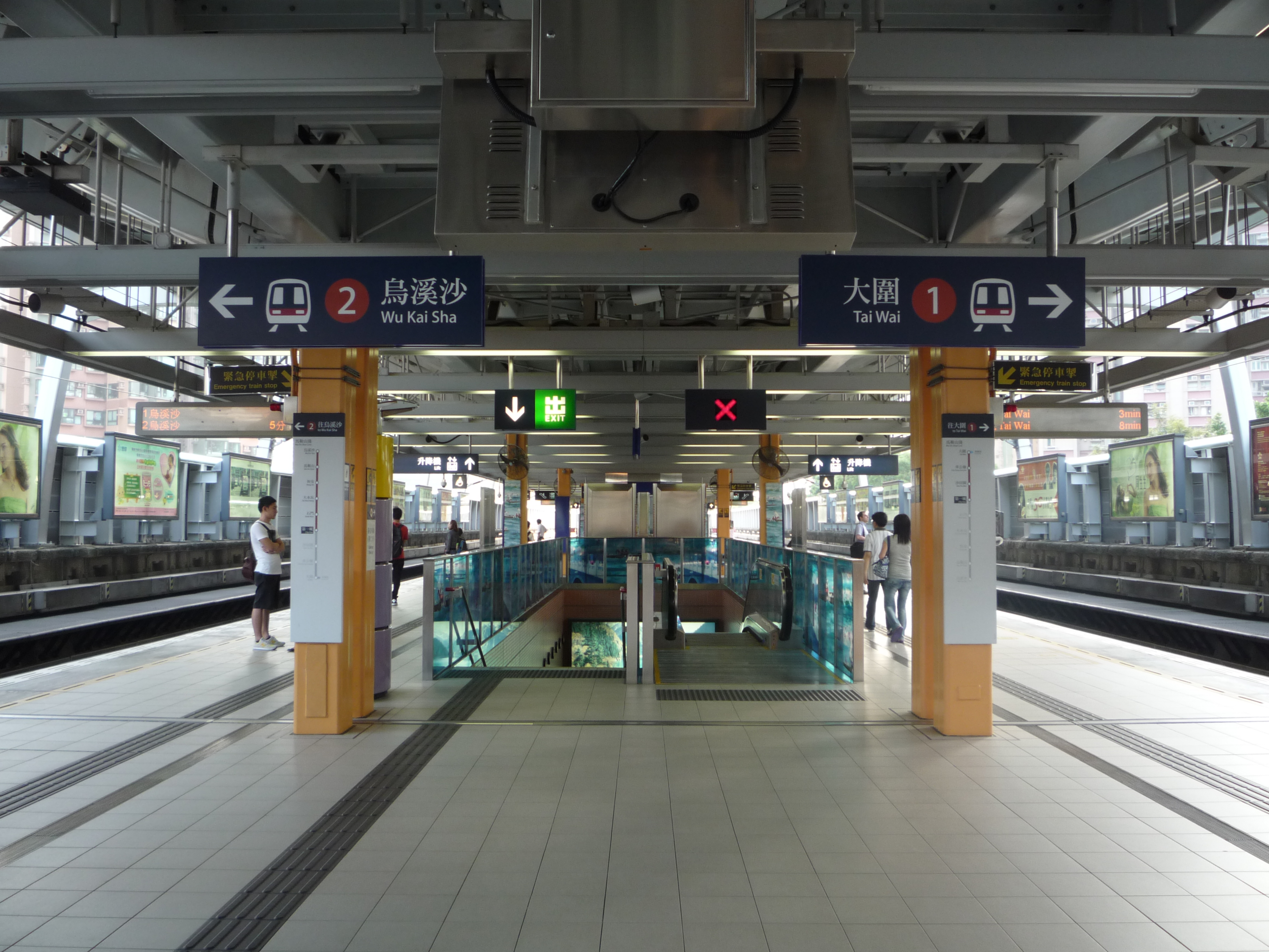 中文（香港）: 港鐵第一城站月台